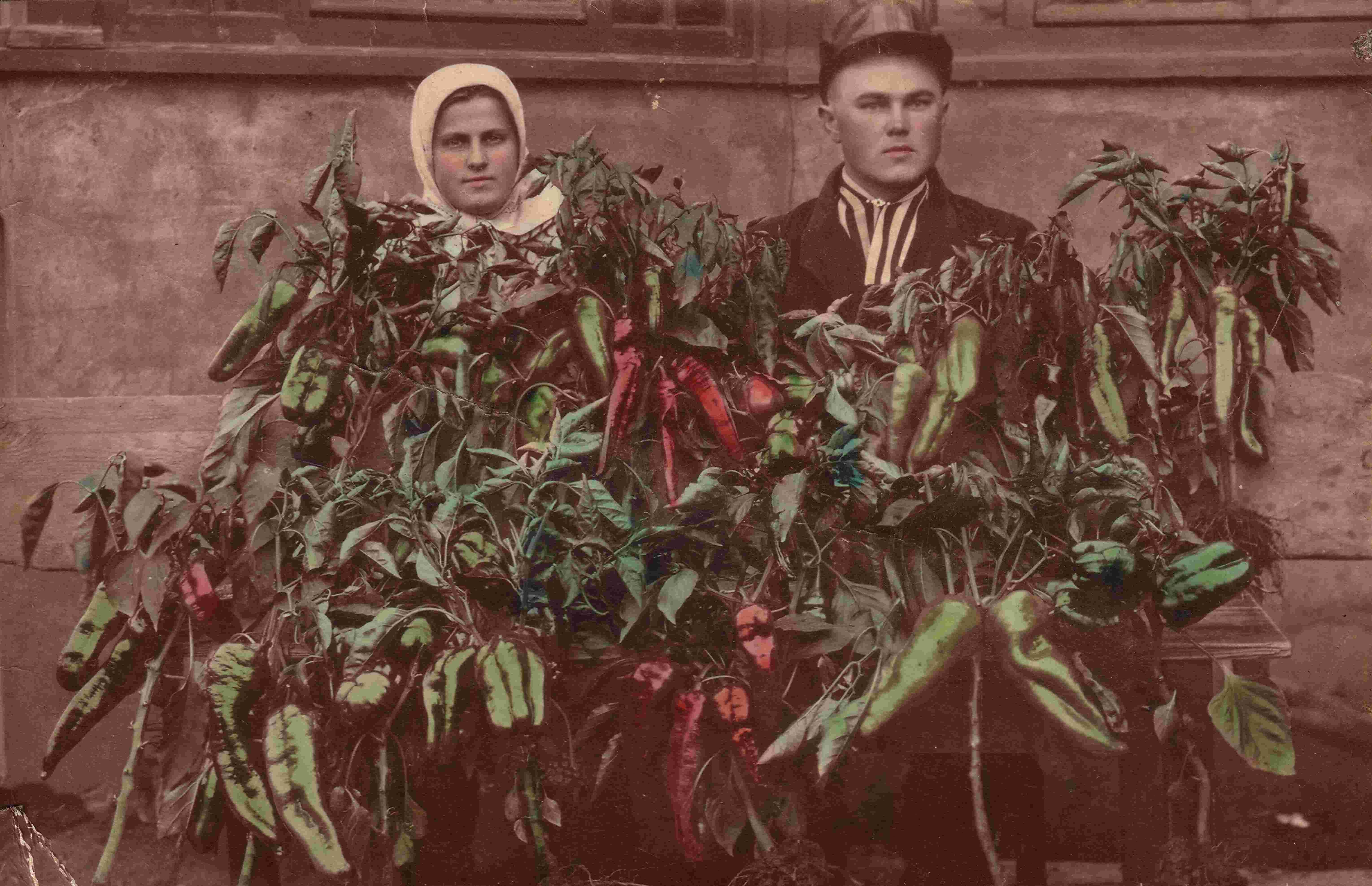 Deti Ondreja Beňu s vyšľachtenou paprikou